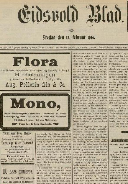 Faksimile av Eidsvold Blad 1914.